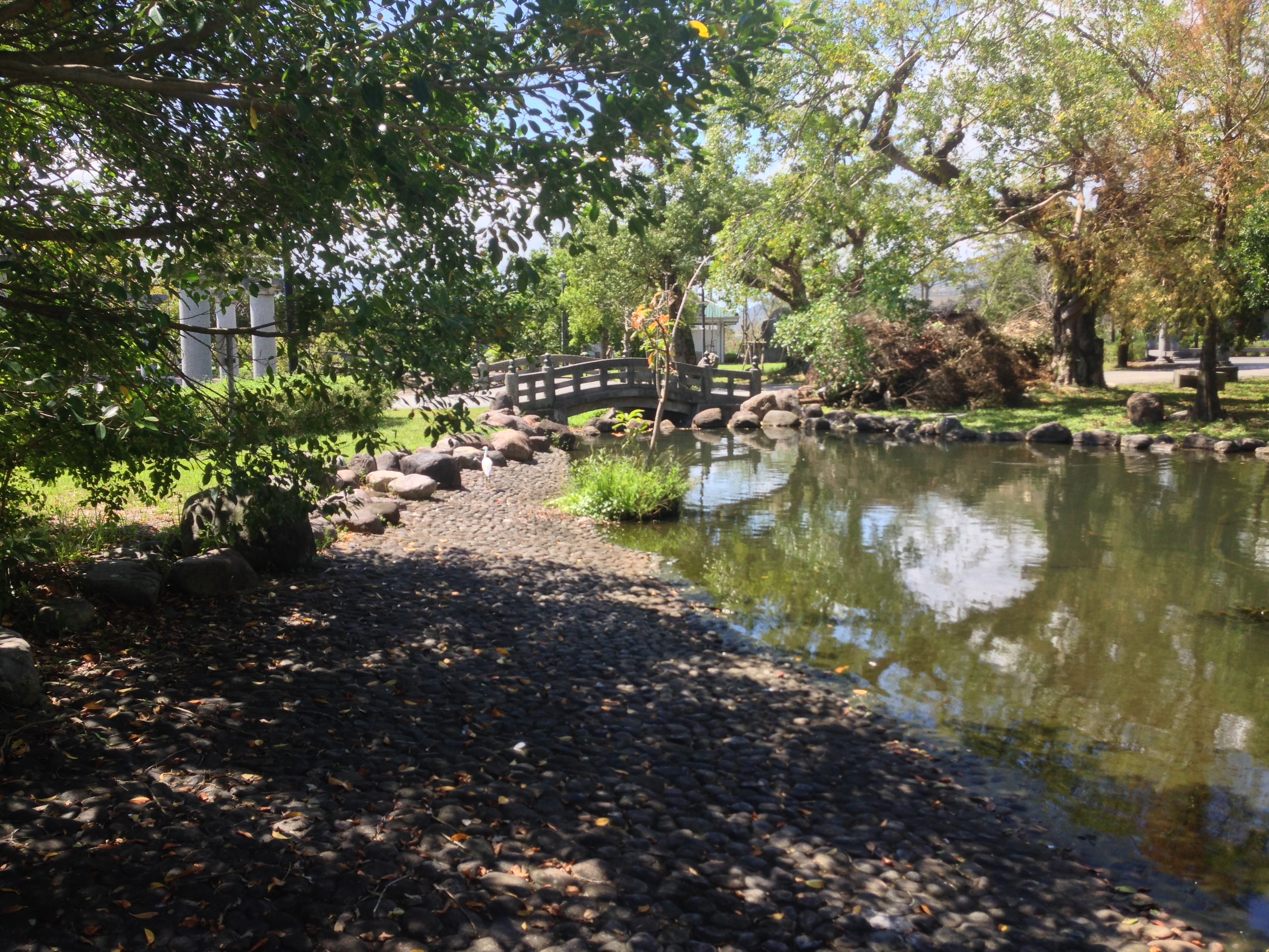 中文（台灣）: 宜蘭神社神橋